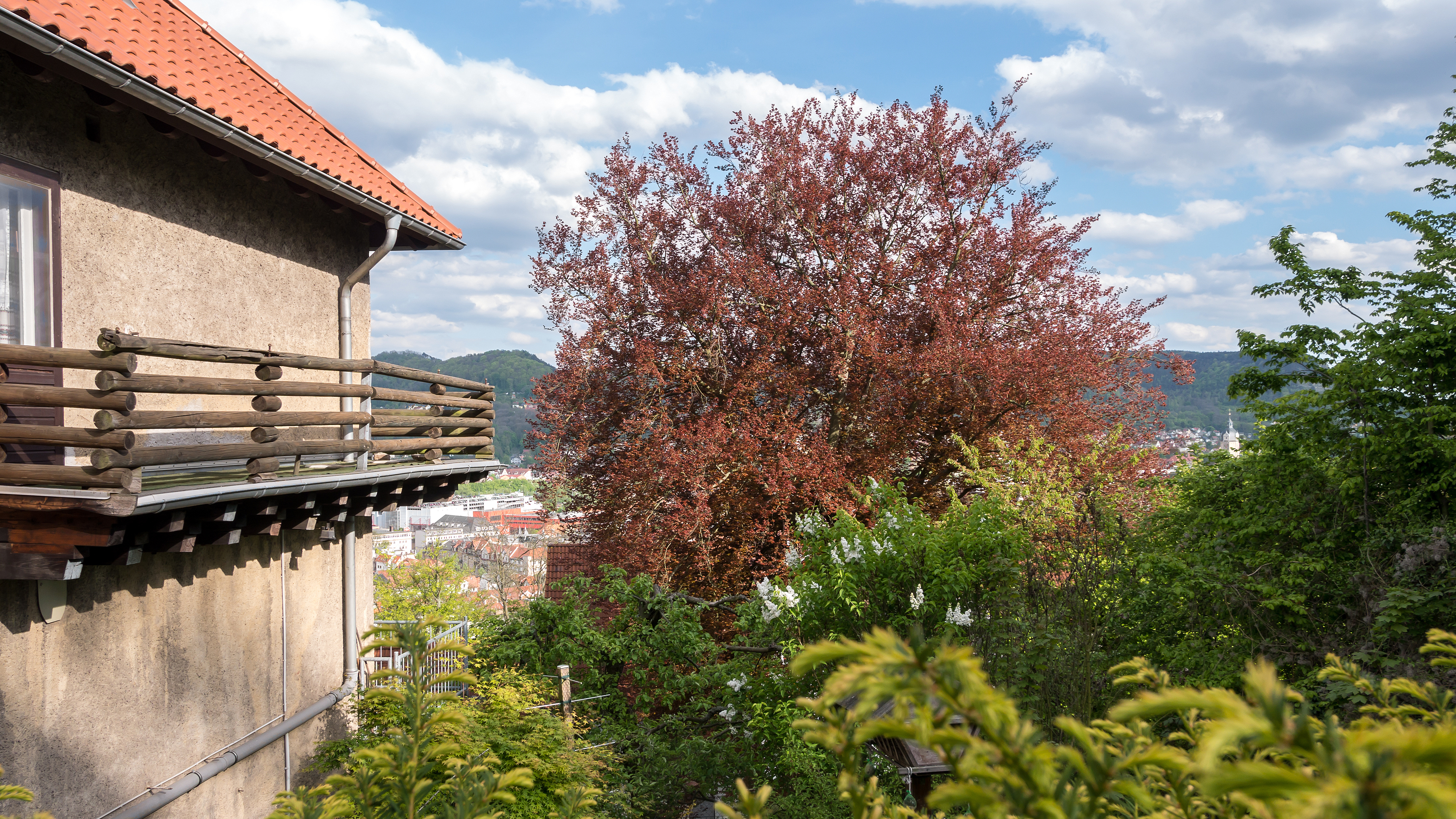 Rotbuche Doc.-Nr. 1996-23 Jena II